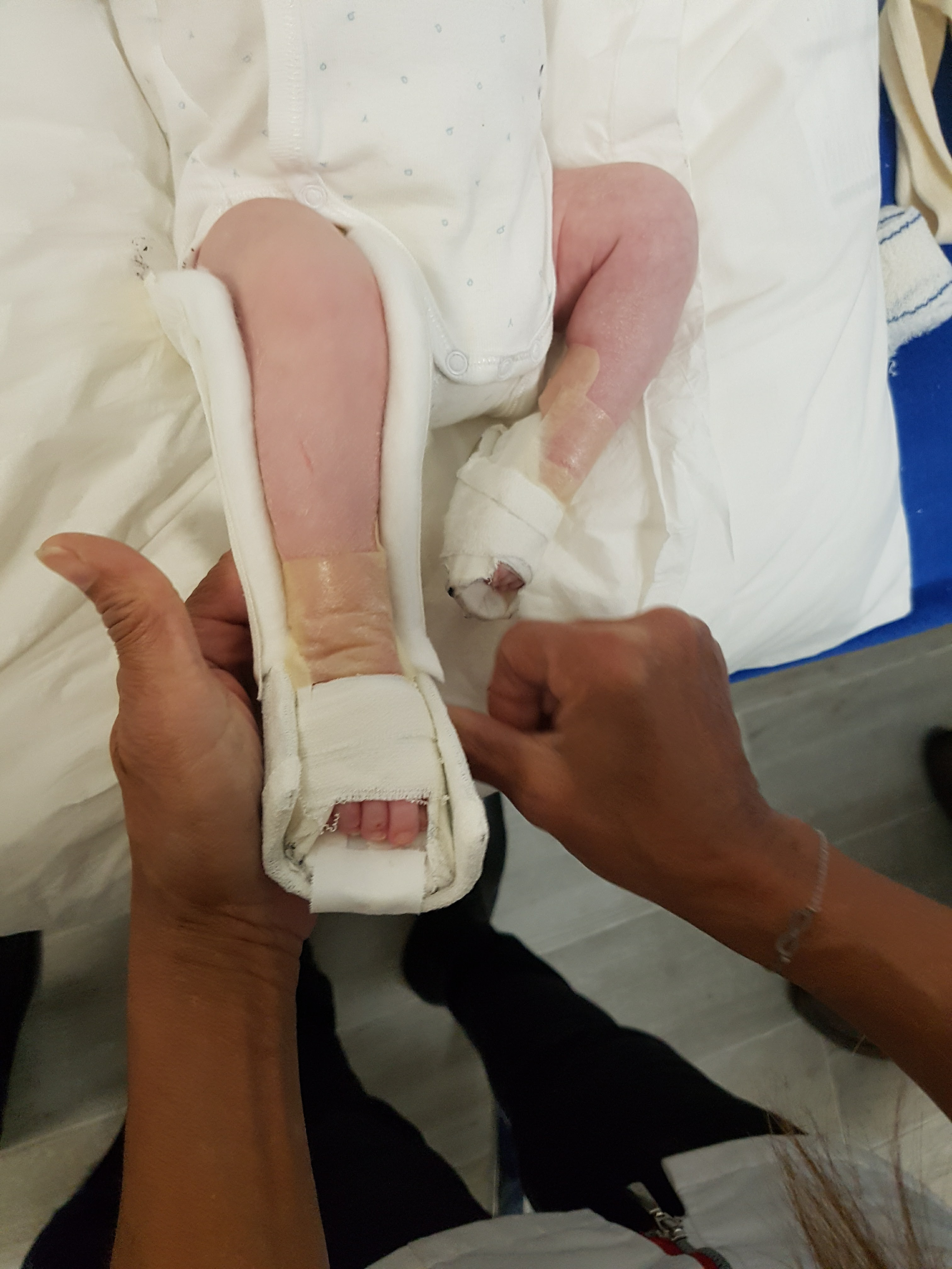 Pied Bot Varus Equin à une semaine du début du traitement fonctionnel